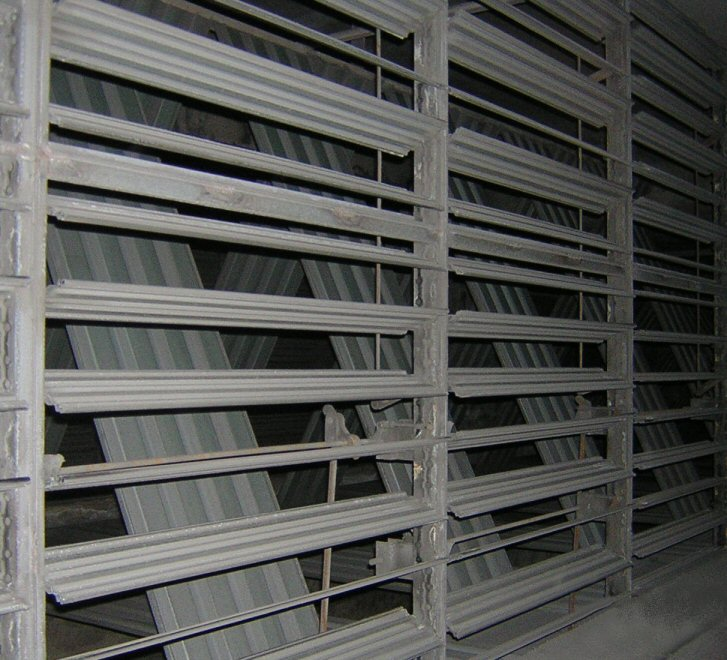 Air damper